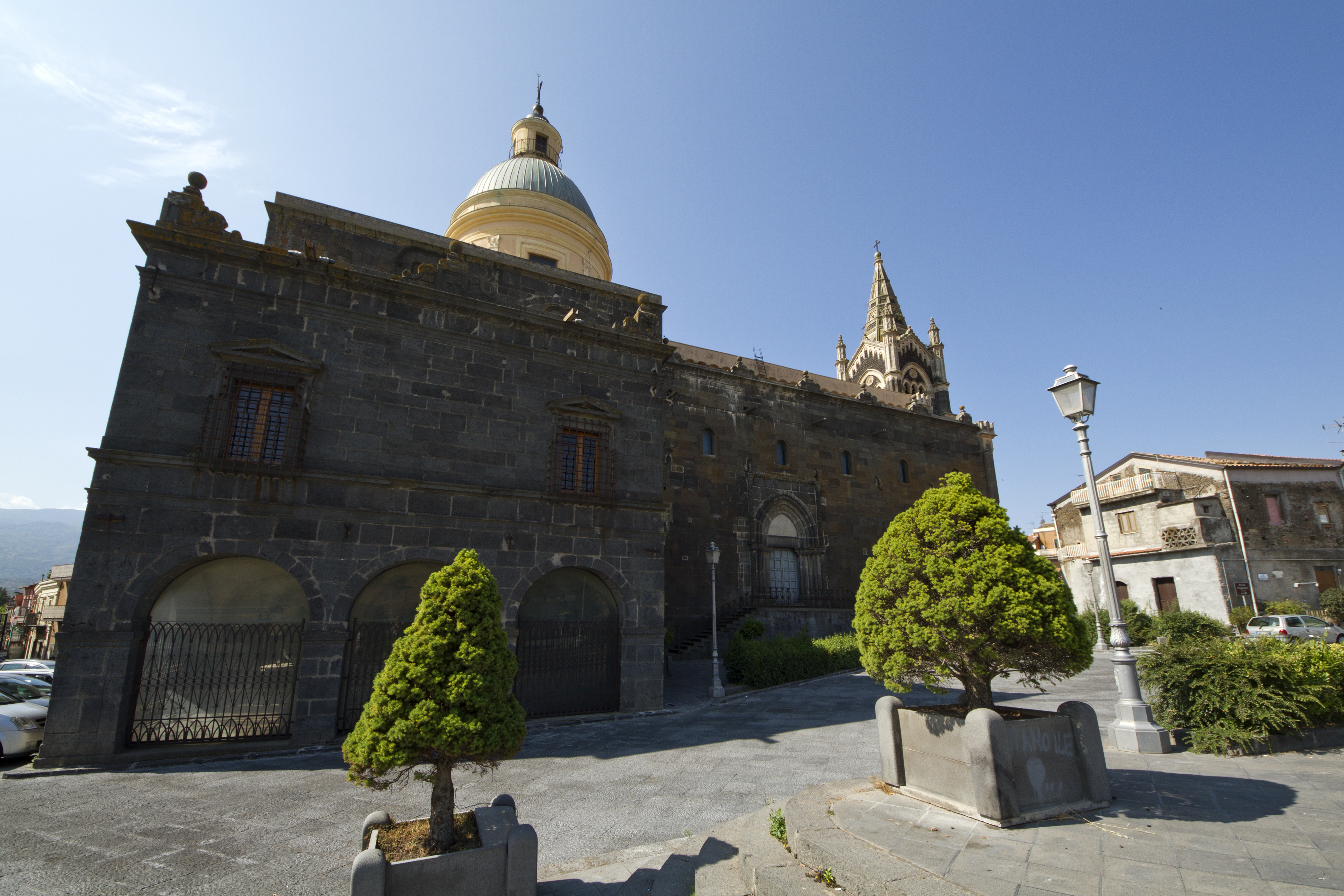 Basilica di Santa Maria, Randazzo, Catania, Sicily, Italy